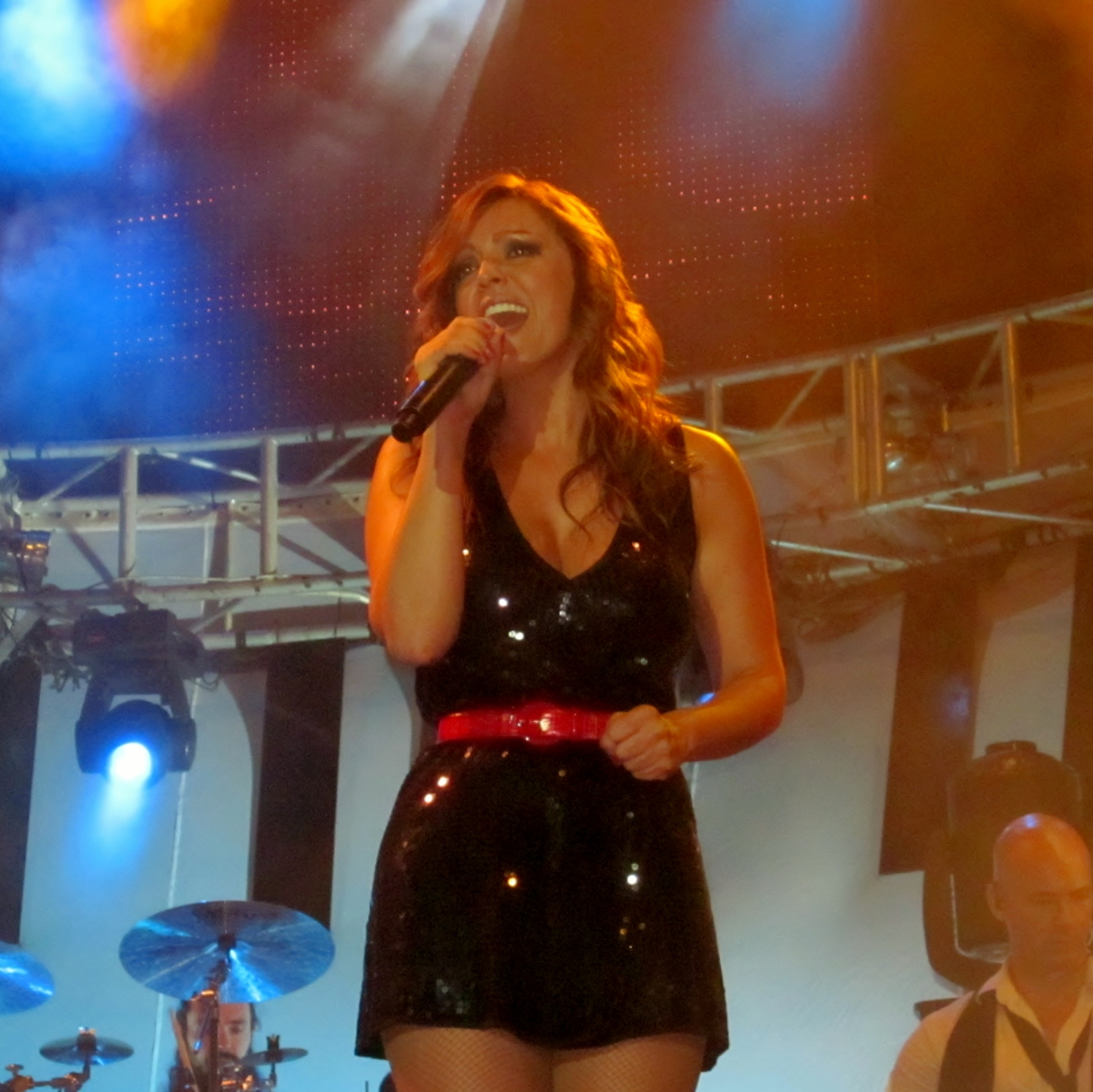 Merche actuando en el Muelle de Cádiz en 2011